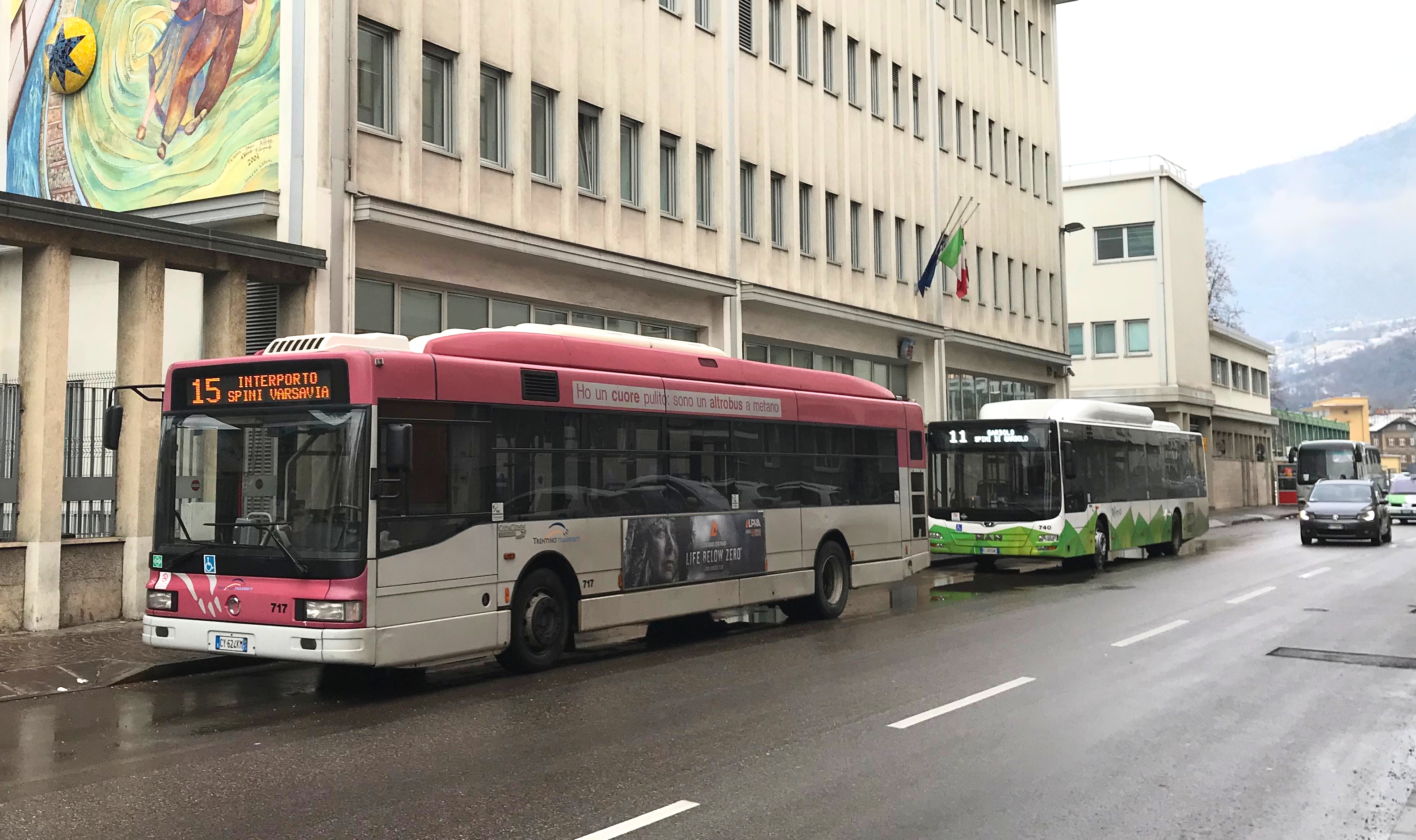 IVECO Cityclass matr.717 (vecchia livrea) + MAN Lion's City matr.740 (nuova livrea) di Trentino Trasporti (Trento) in servizio urbano sulle Linee 15 e 11 in Via Dogana.